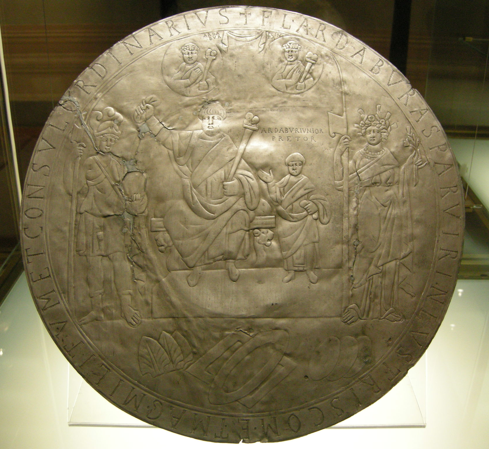 Piatto di ardaburio, argento fuso, 434 d.c. (found in 1769)